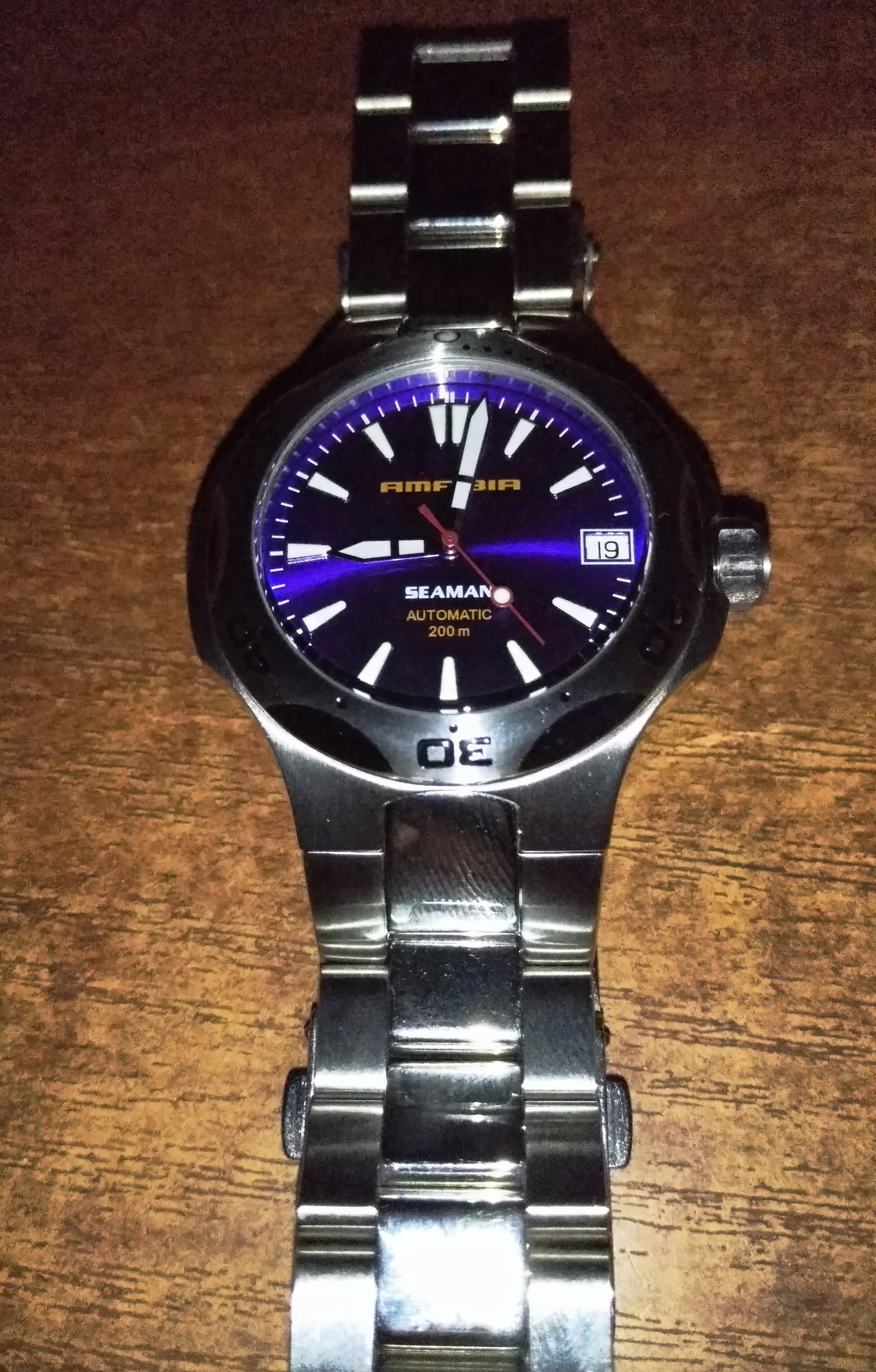 Часы Amfibia Seaman из серии "Новая Амфибия", 2018 г.